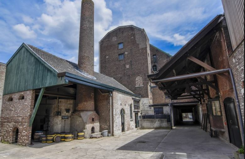 Brauerei Bosch Innenhof